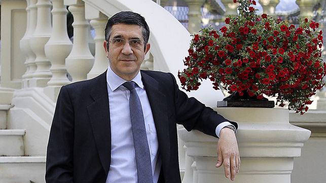 Patxi López lors d'une interview en mai 2013.